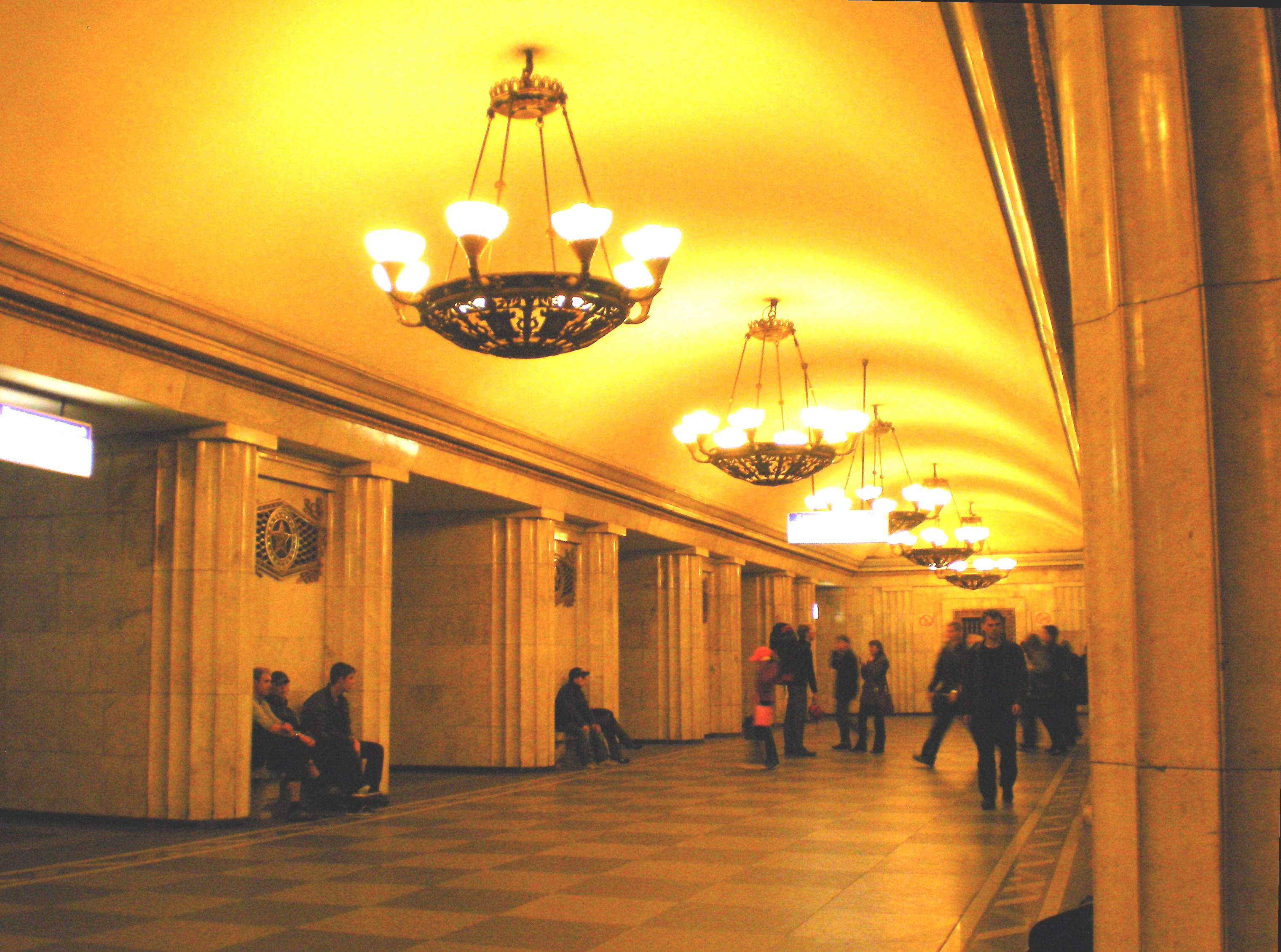 Станция метро «Владимирская». Центральный зал, вид в от выхода.